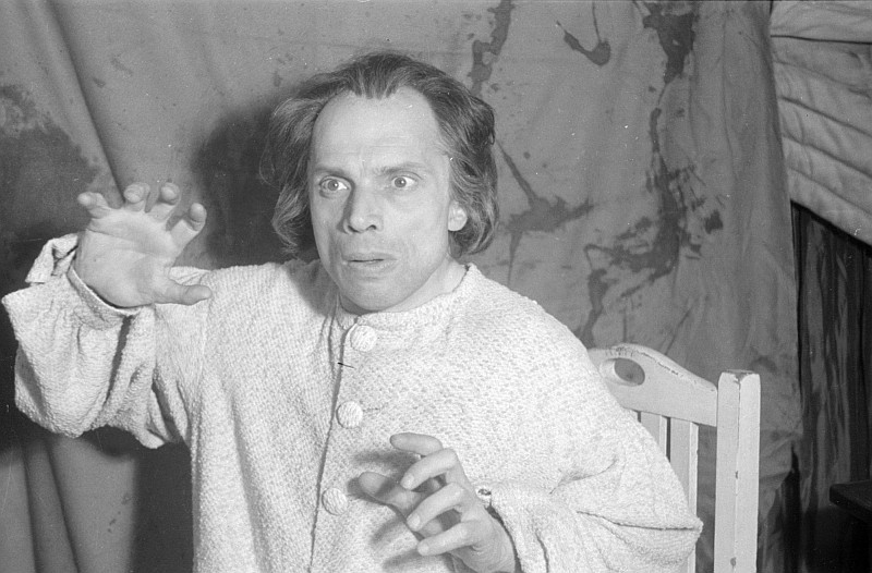 Original image description from the Deutsche Fotothek Szenenbilder